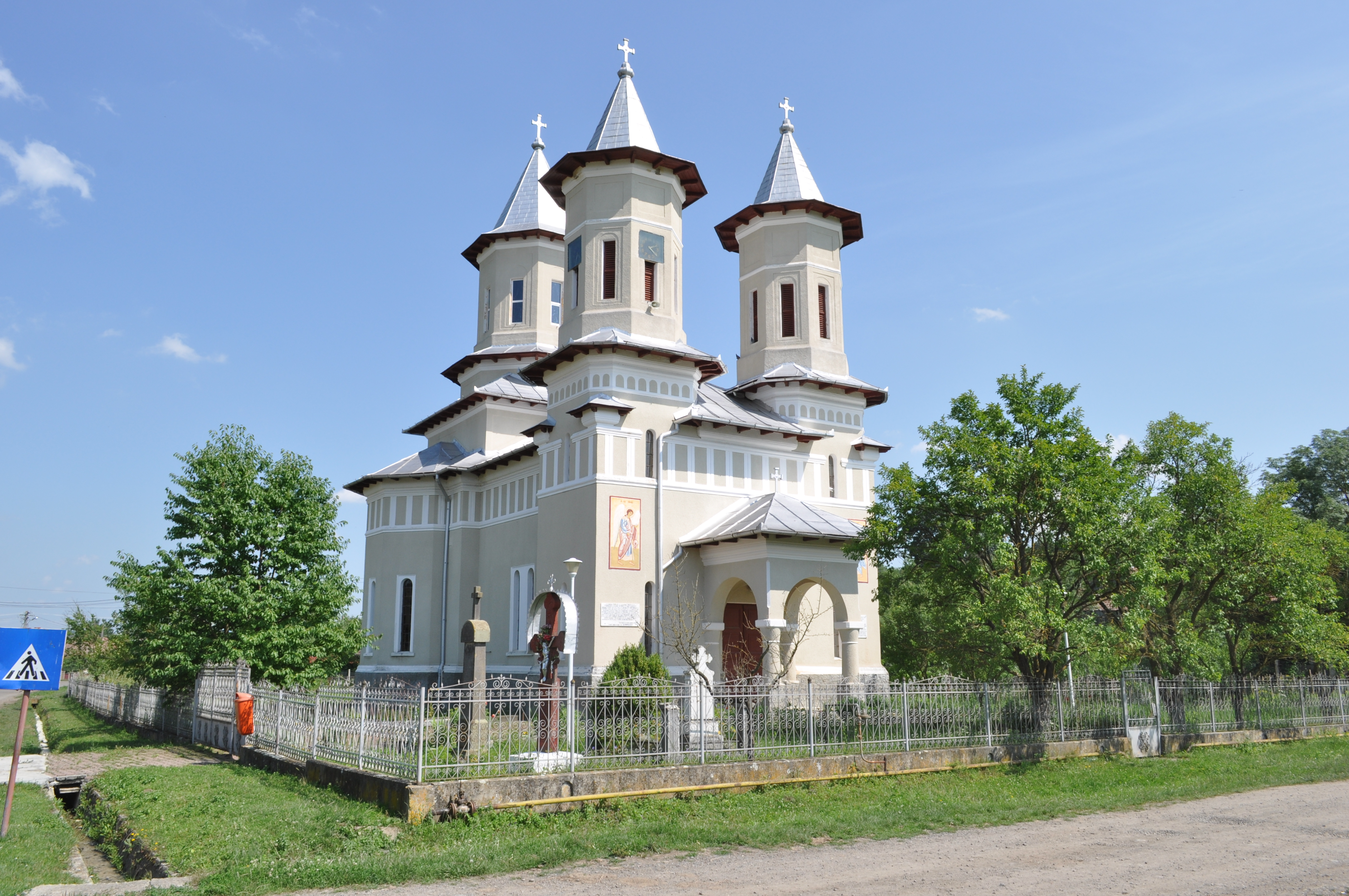 Biserica ortodoxă „Sfinții Arhangheli”, Frunzeni, județul Mureș.